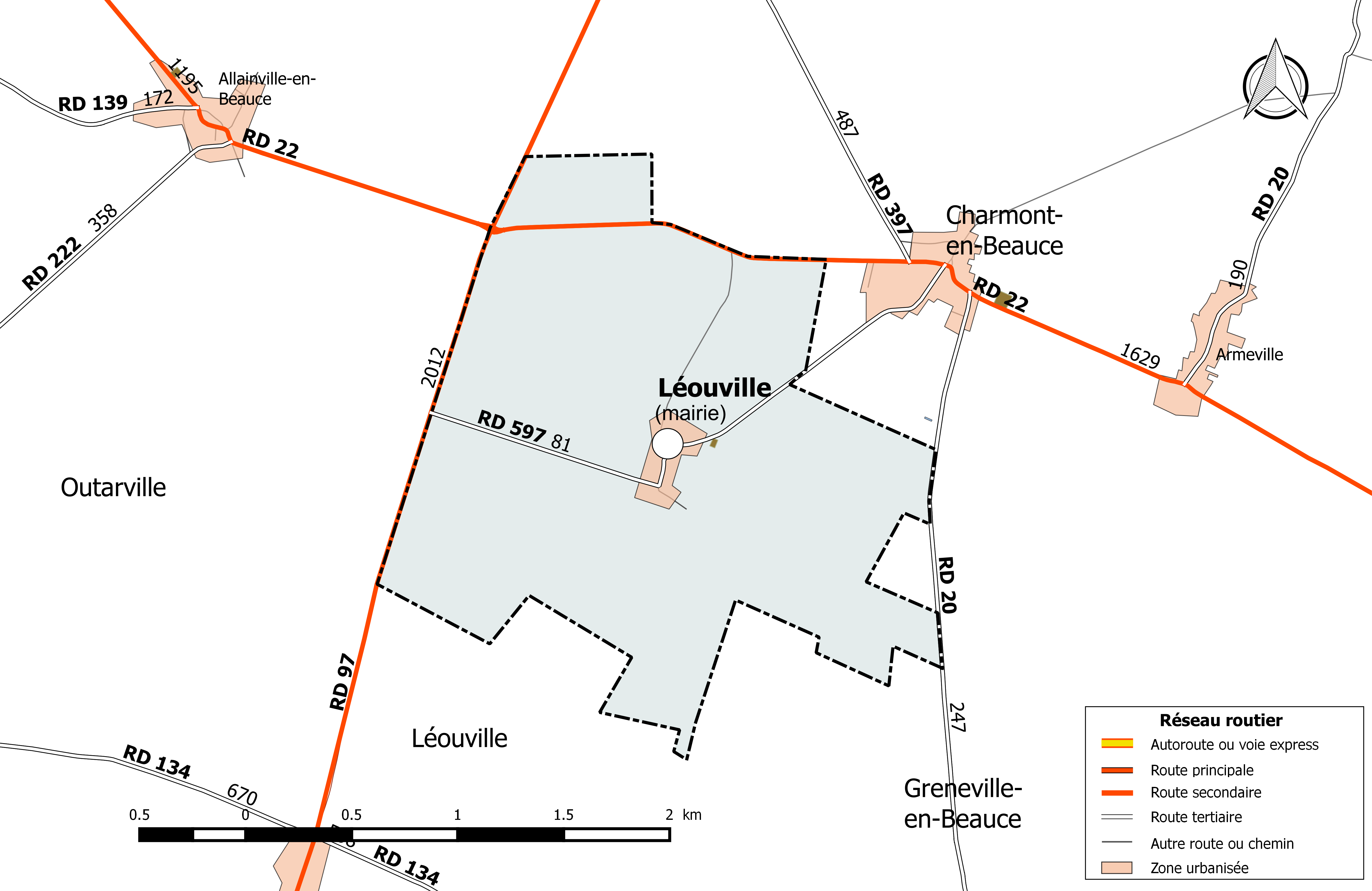 Carte du réseau routier de la commune de Léouville.